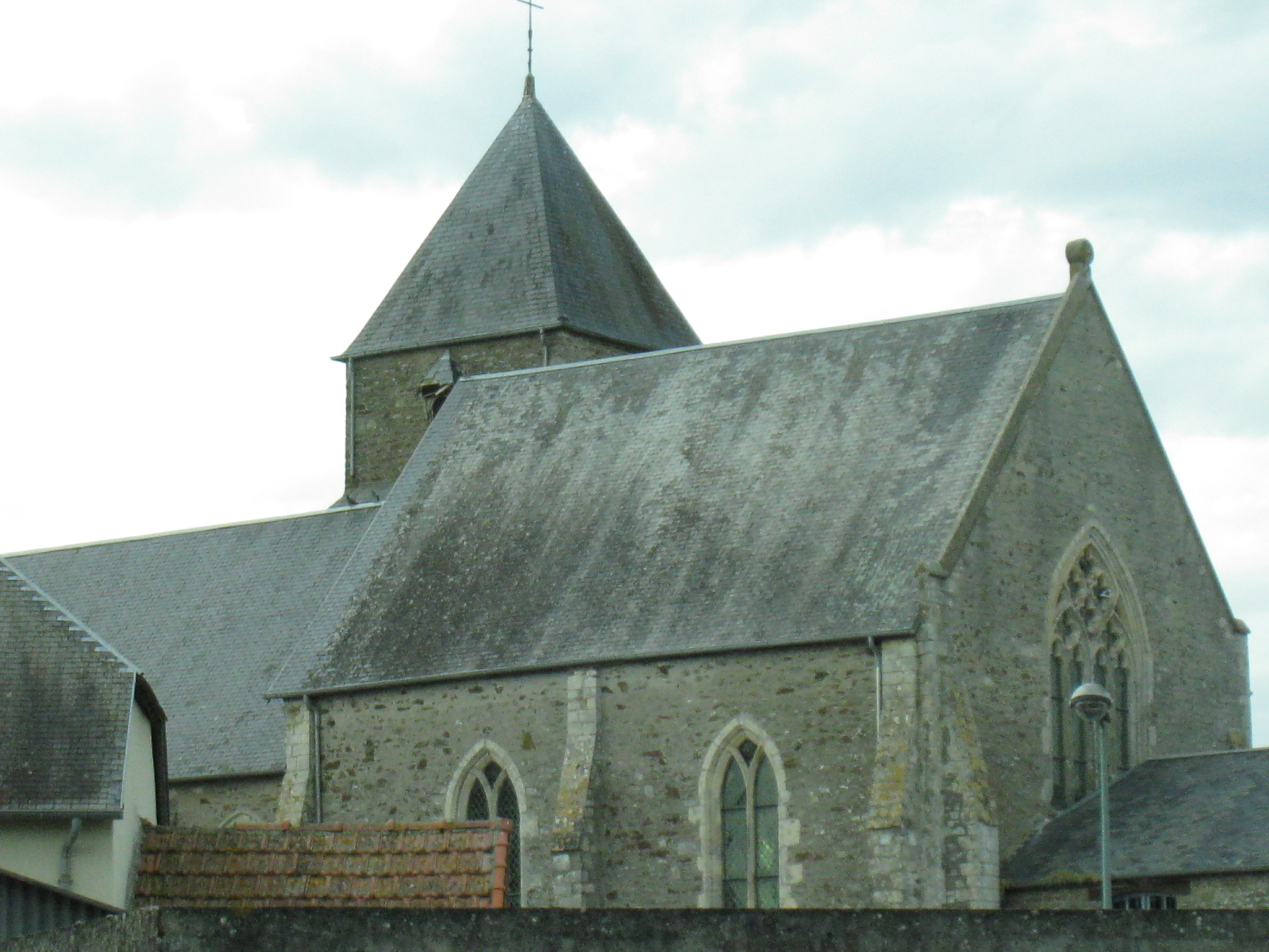 Eglise de Saint-Ébremond-de-Bonfossé (plan latéral droit)